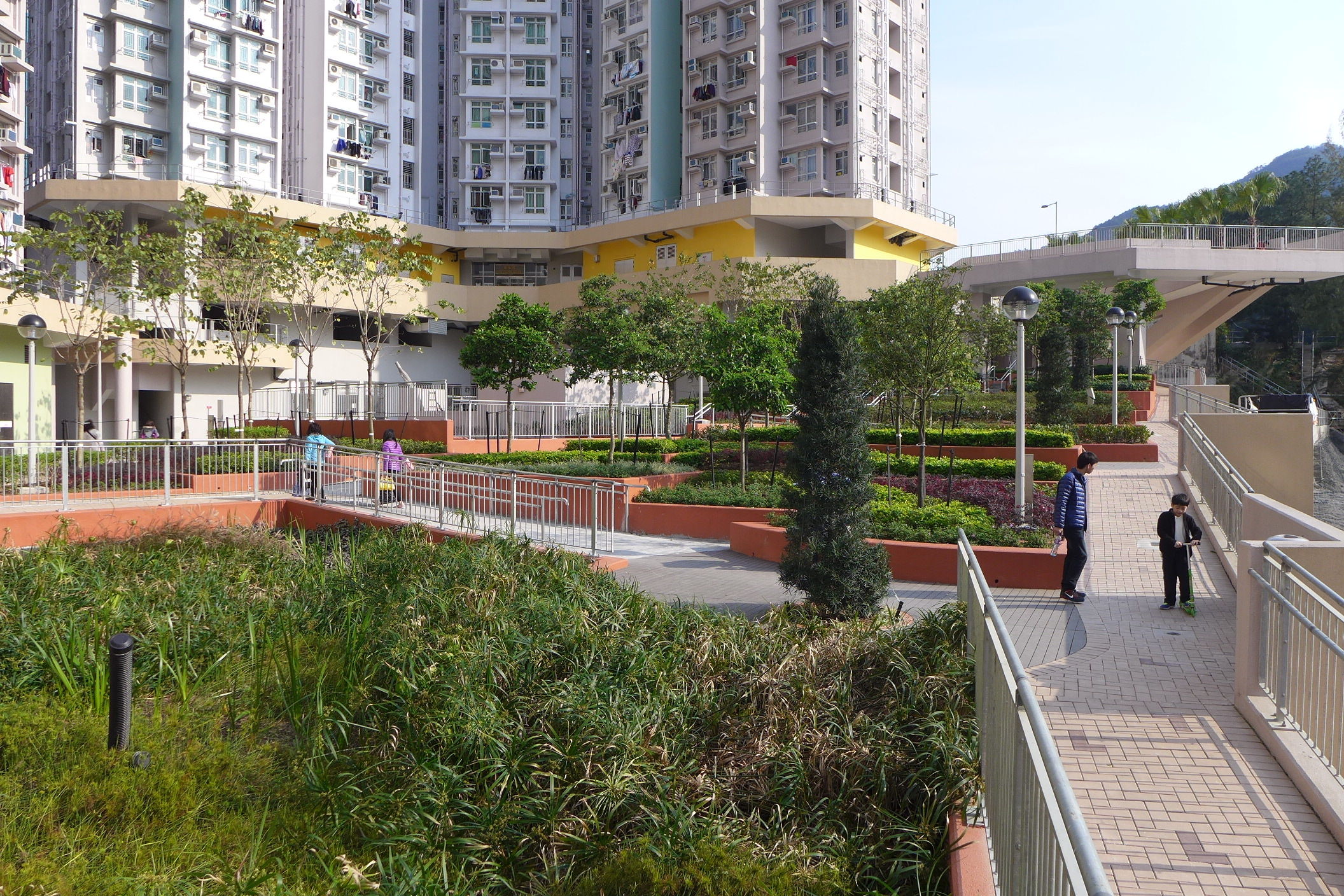 Shui Chuen O Estate Rainwater Garden